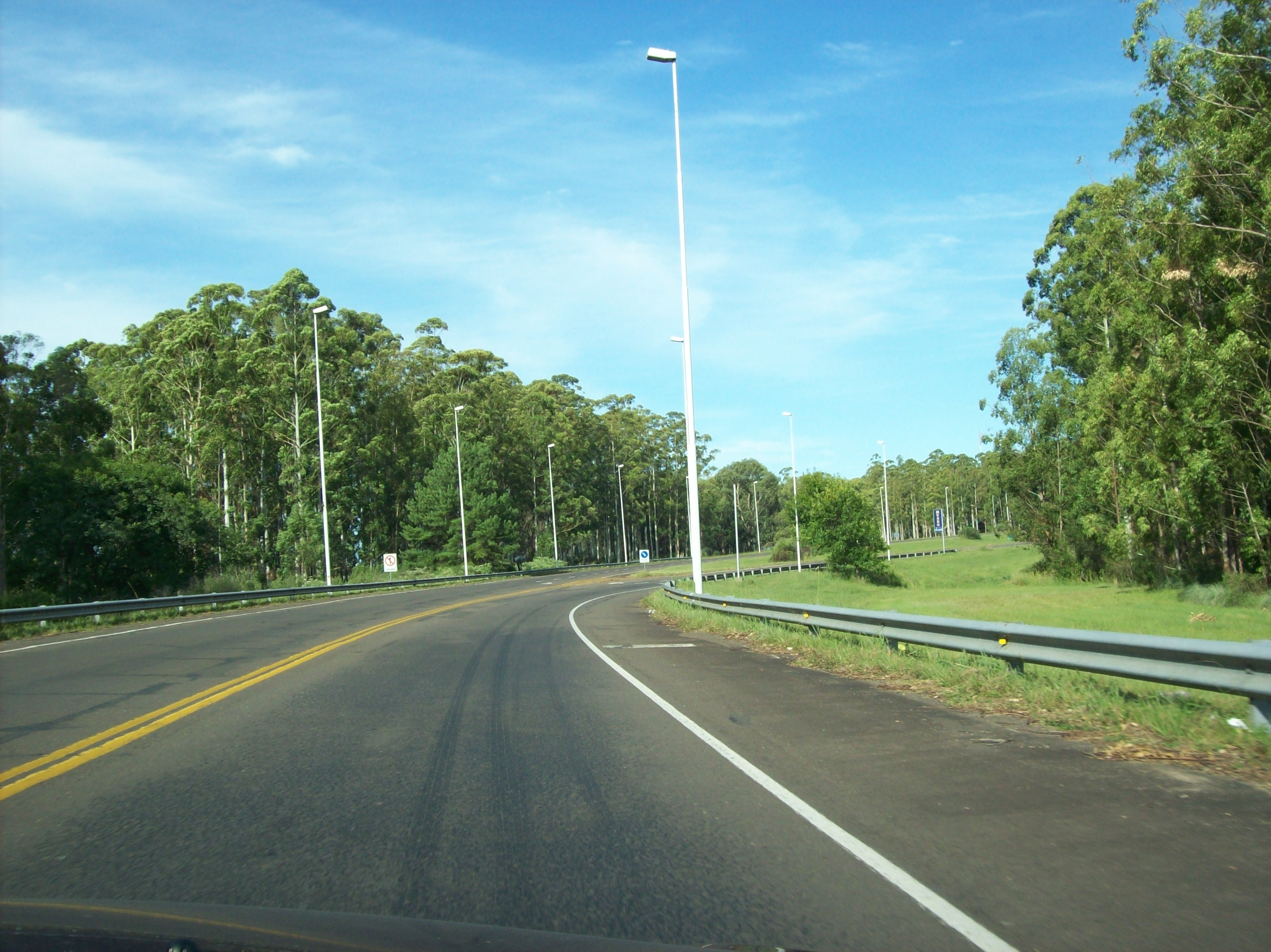 Ruta Nacional A015 (Argentina) cerca de la zona aduanera, en el Departamento Concordia, Provincia de Entre Ríos, República Argentina.